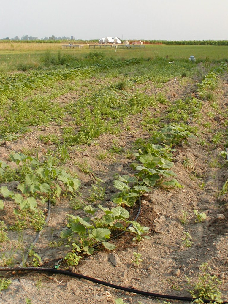 Riego por goteo.